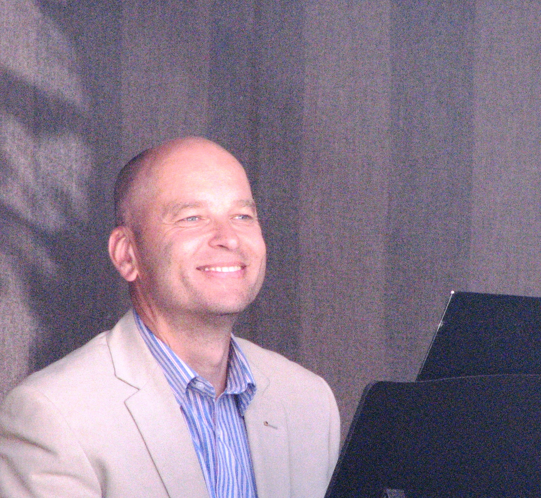 Veikko Lehto esinemas Kuressaare Arensburgi ooperikohvikus